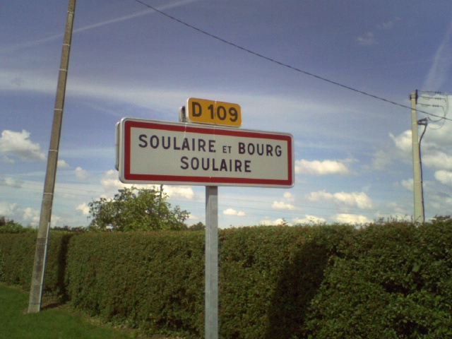 Panneau d'entrée de la commune de Soulaire-et-Bourg (Maine-et-Loire, France). Source Photo de M. Mouchoir.